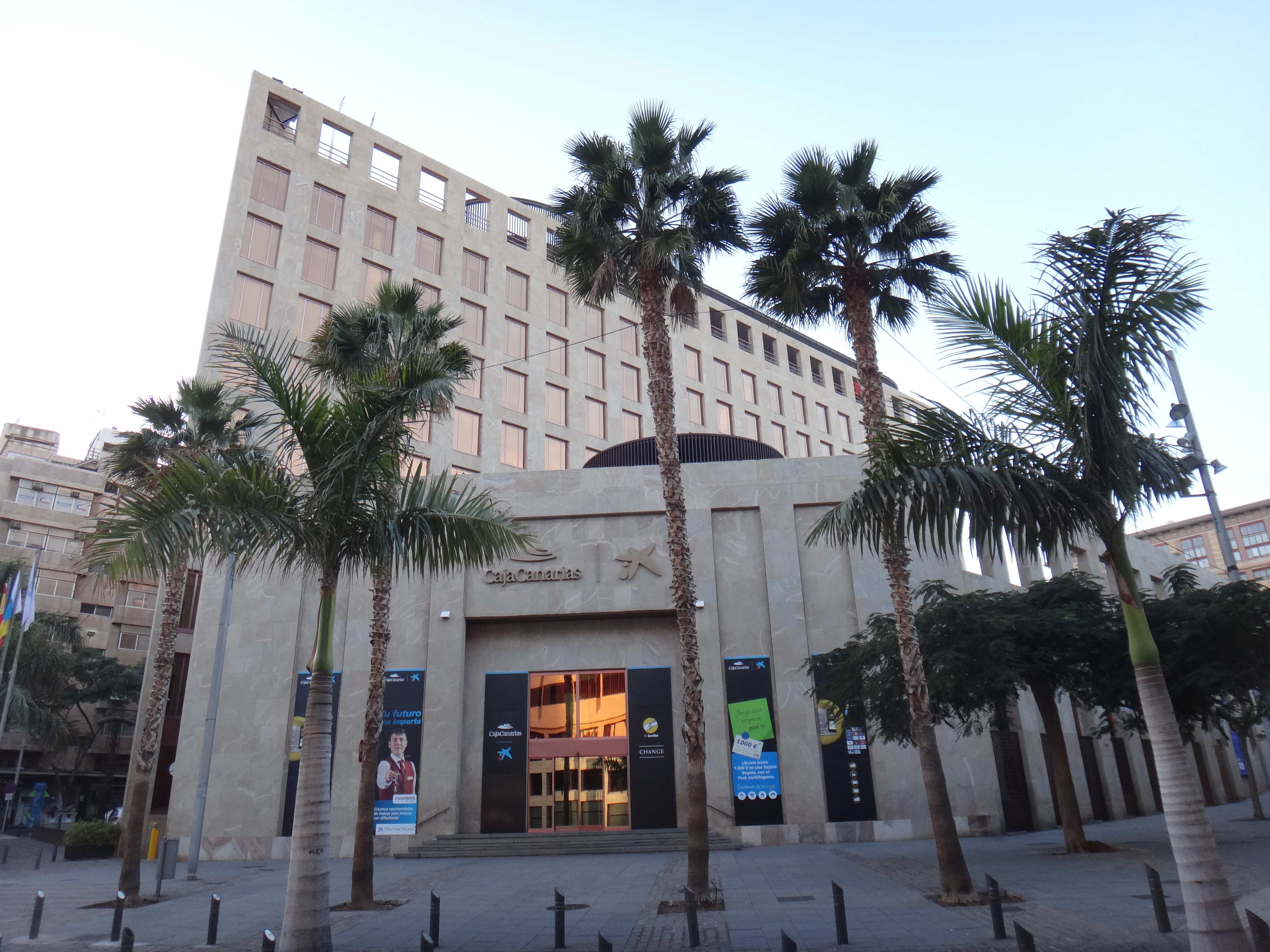 Santa Cruz de Tenerife, Spain